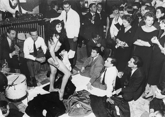 lo spogliarello del ‘58 di Aiché Nanà al Rugantino, a Trastevere, che ispirò Federico Fellini.